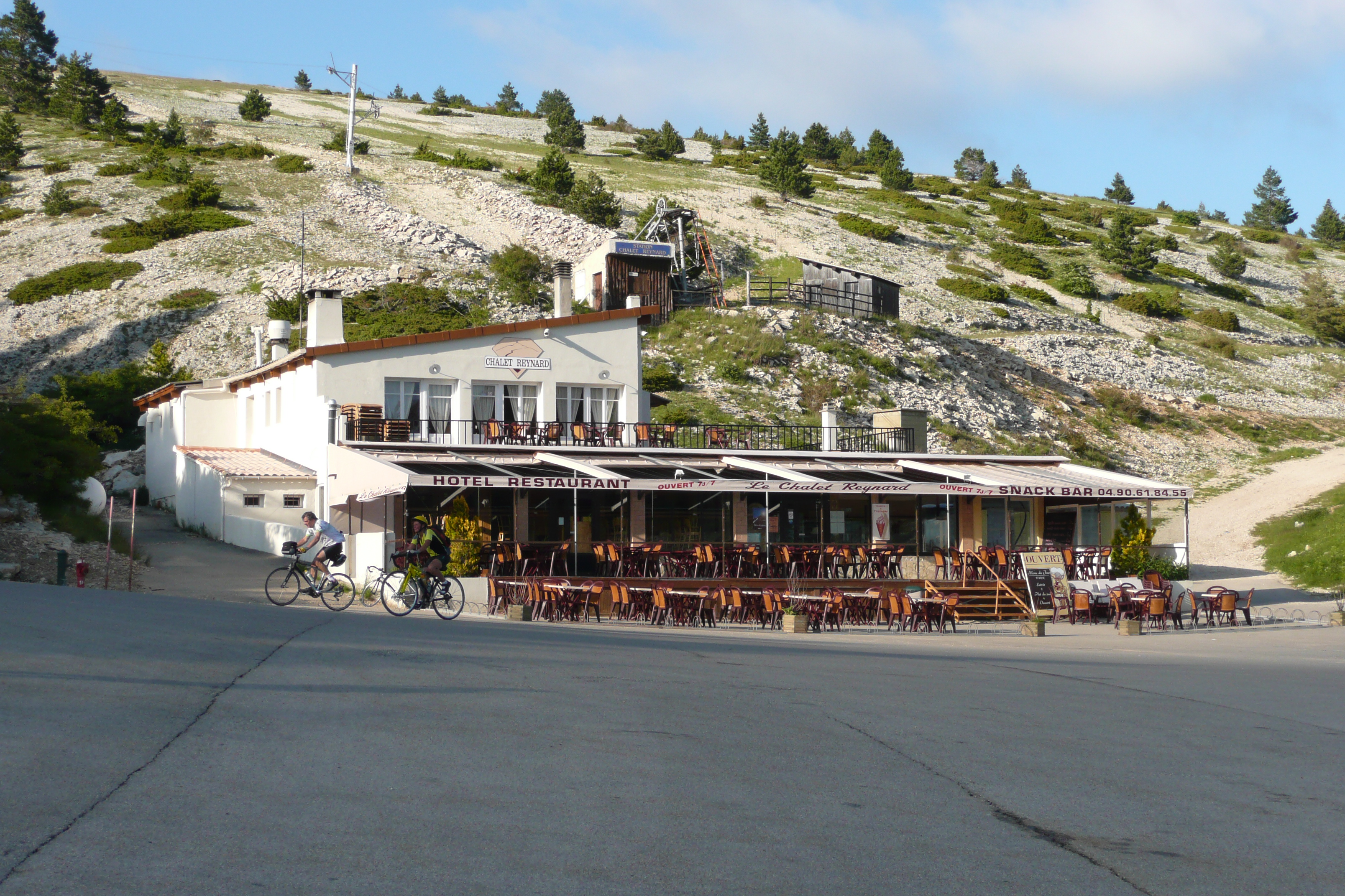 Chalet Reynard près du Mont Ventoux.